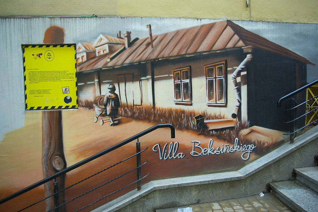 Graffiti przedstawiające nieistniejący dom Beksińskich, położony w przeszłości przy ul. Jagiellońskiej